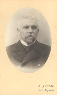 Vassili Jefimovitš Tarassenko